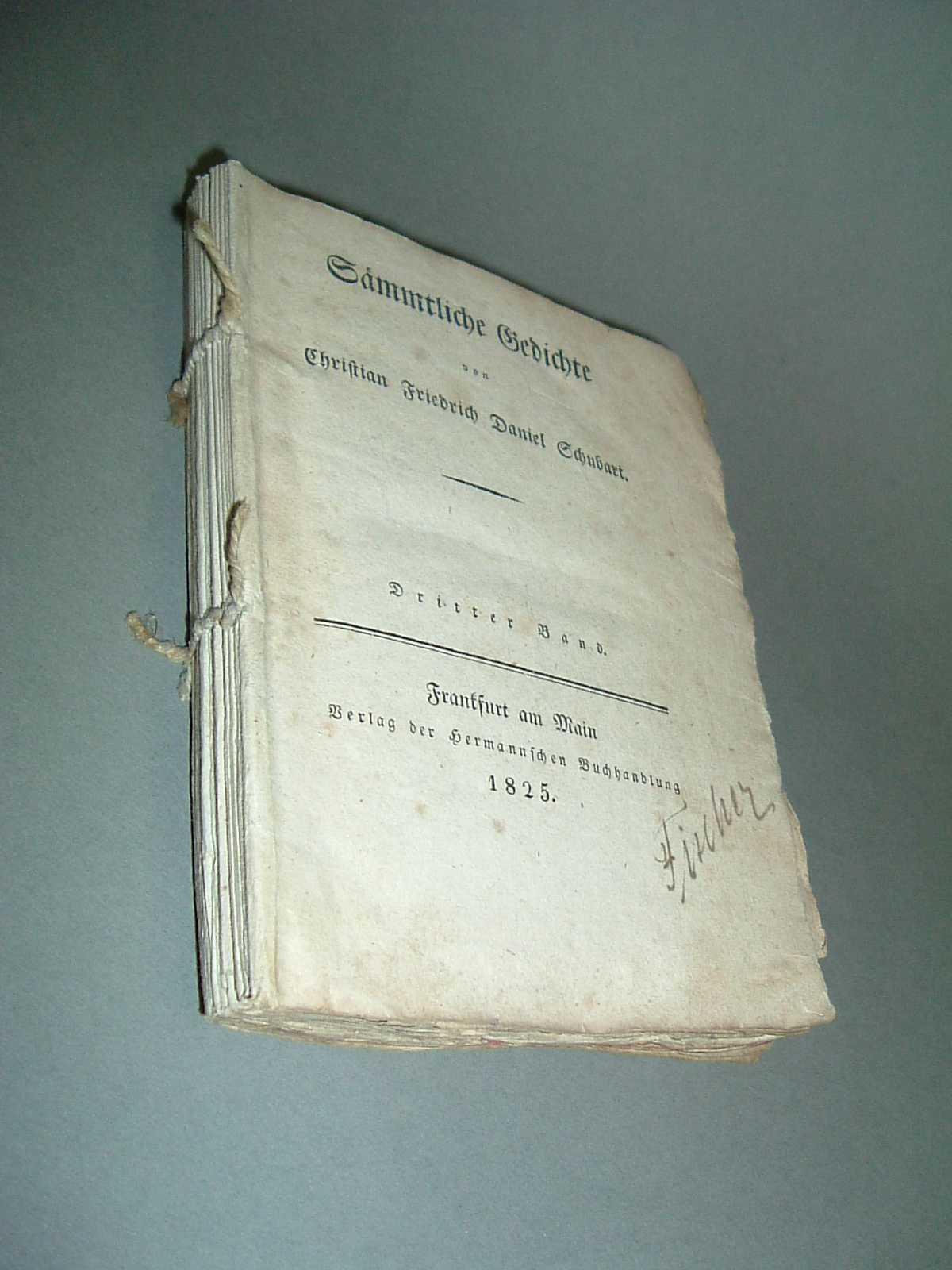 Beispiel eines losen Buchblocks. Hier: Sämtliche Gedichte von Schubart, 1825.